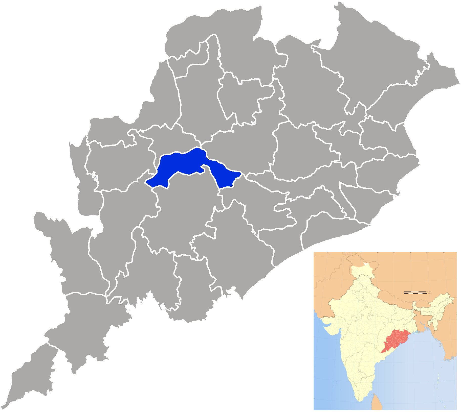 Boudh district in Orissa